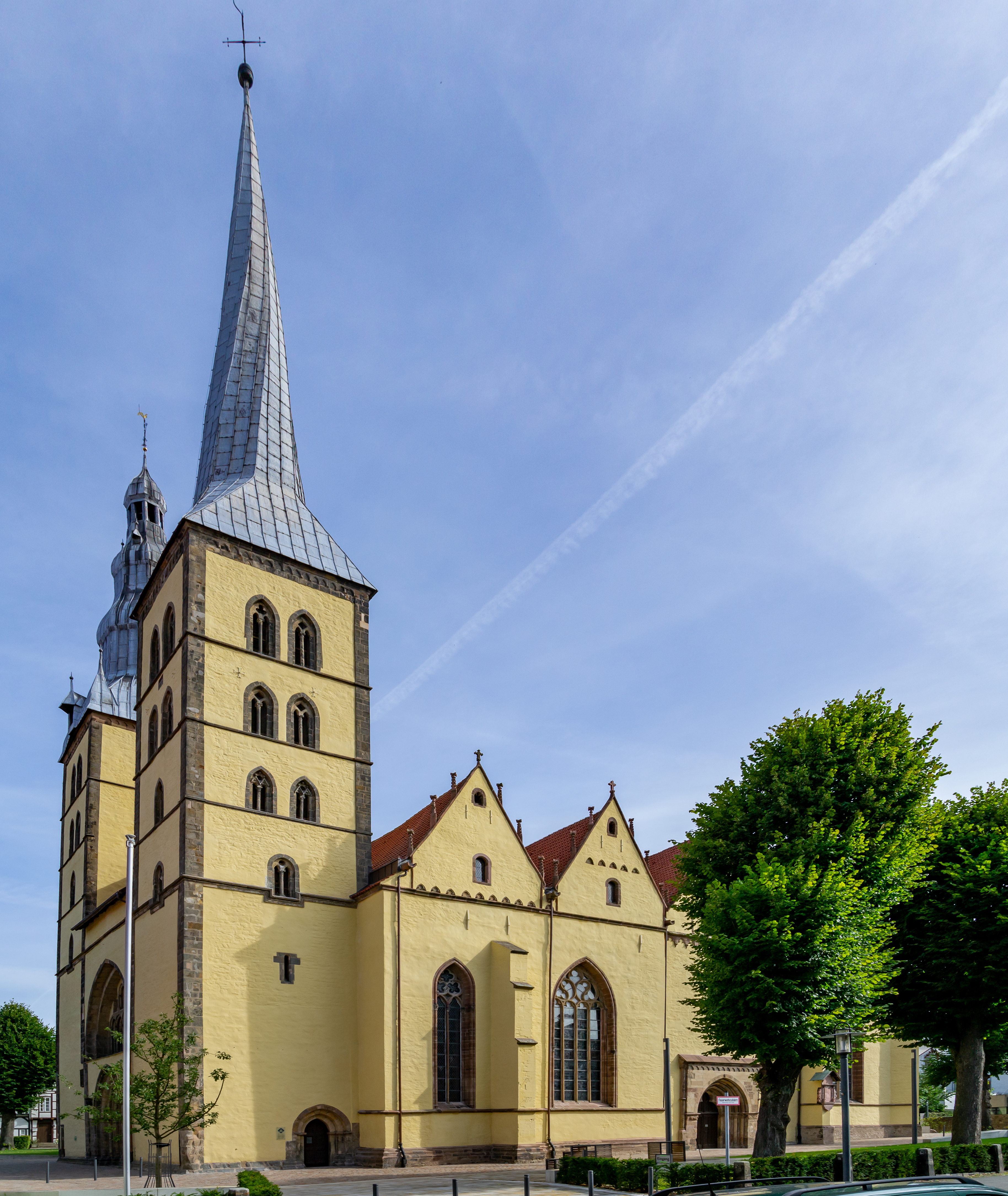 evangelisch-lutherische Kirche St. Nicolai in Lemgo